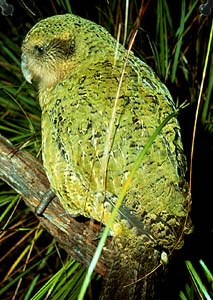 enwikiről